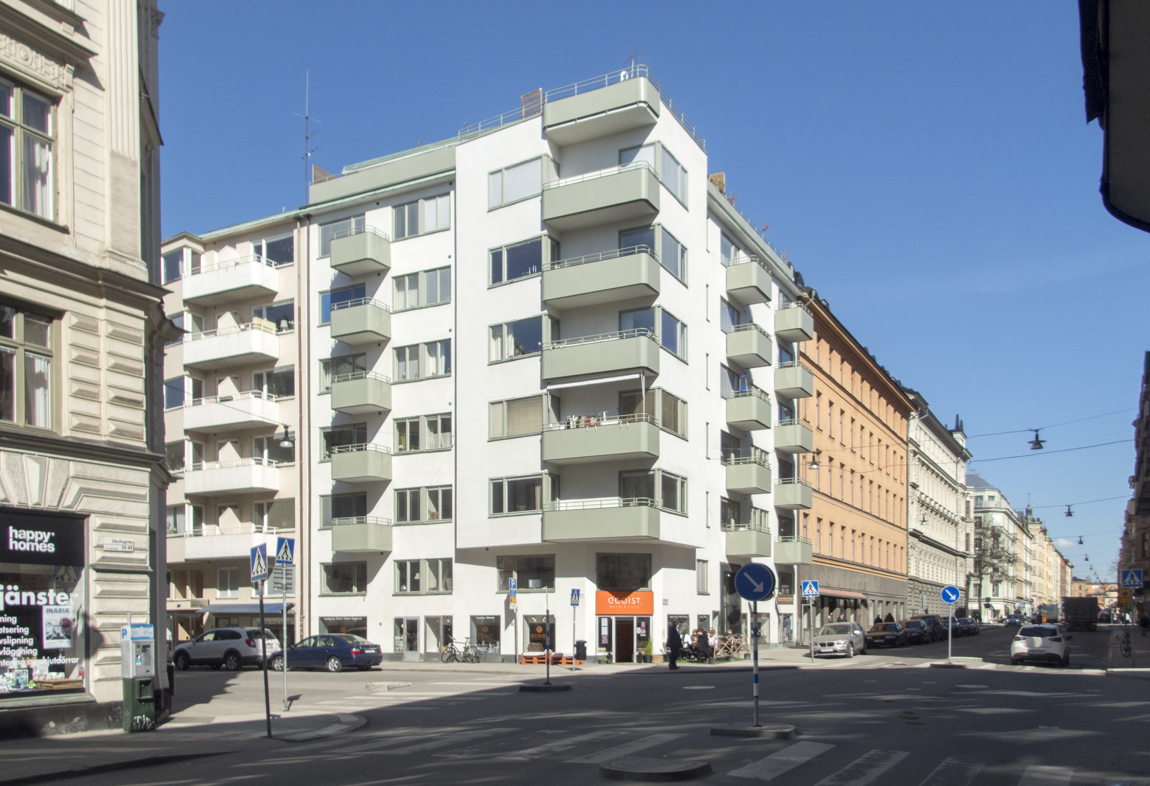 Forellen 14, Sibyllegatan 51 / Kommendörsgatan Stockholm. Nybyggnadsår 1938 - 1939 E. Lind (Byggmästare) Fastighetsföreningen Forellen Nr 9 u p a (Byggherre) Jakob Hebert (Arkitekt)